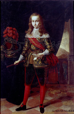 Retrato de Juan José de Austria (1629–1679), que fue un destacado político y militar español e hijo ilegítimo del rey Felipe IV de España y de la actriz María Calderón.